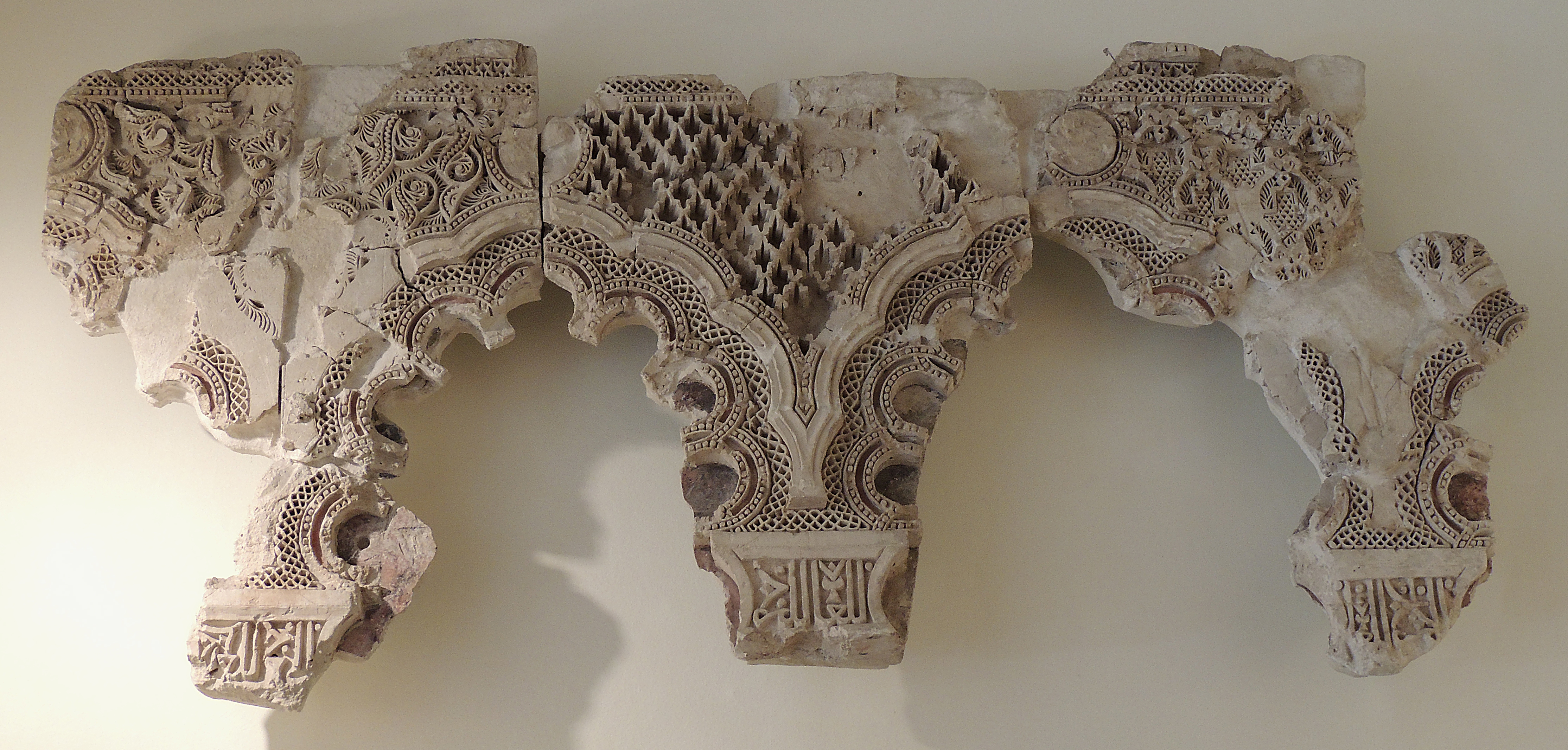 Yeserías procedentes de la capilla de los Orozco